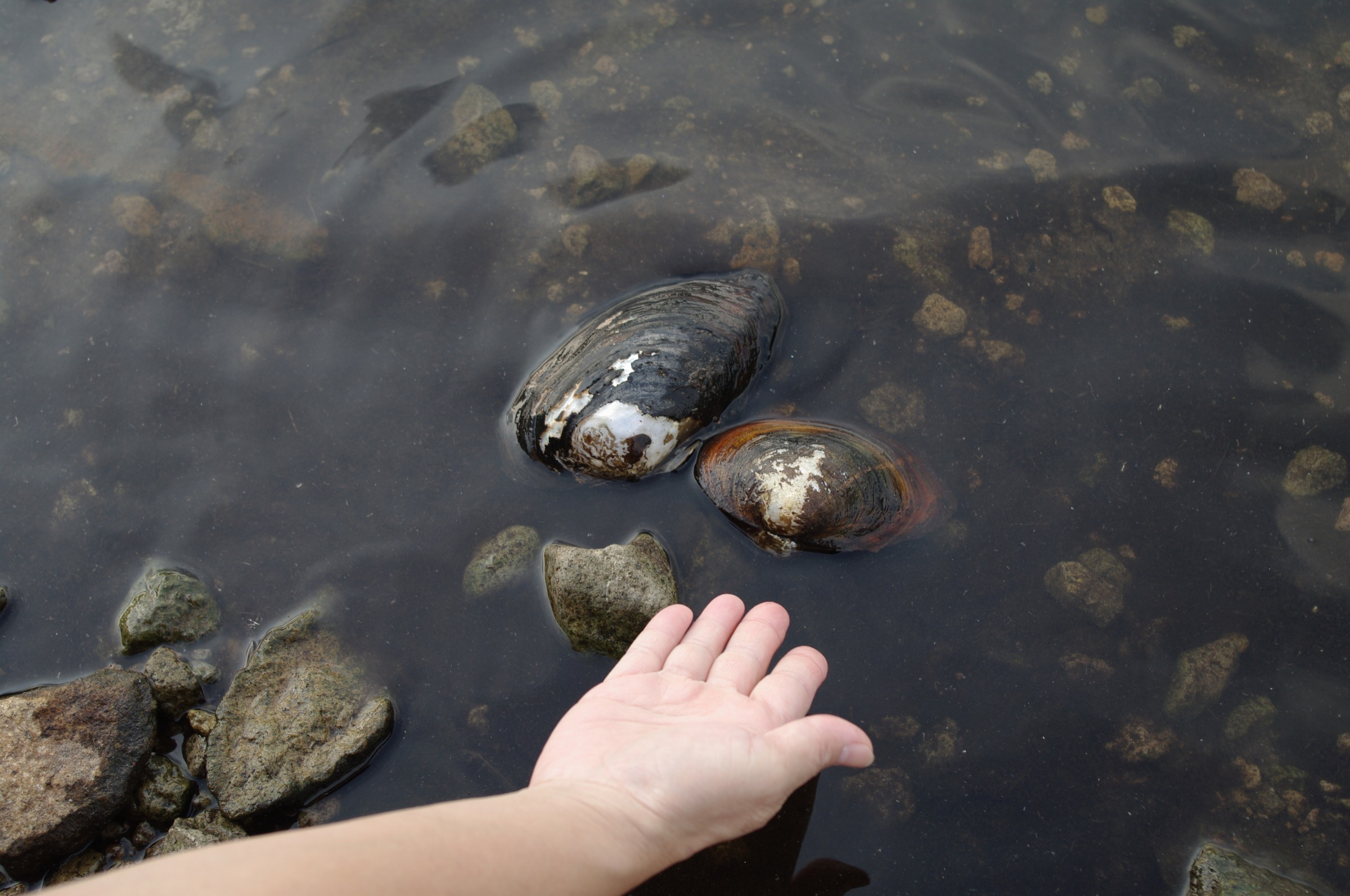 ドブガイ（Sinanodonta woodiana）。淡水に生息するイシガイ科の二枚貝。鹿児島県の藺牟田池での写真。